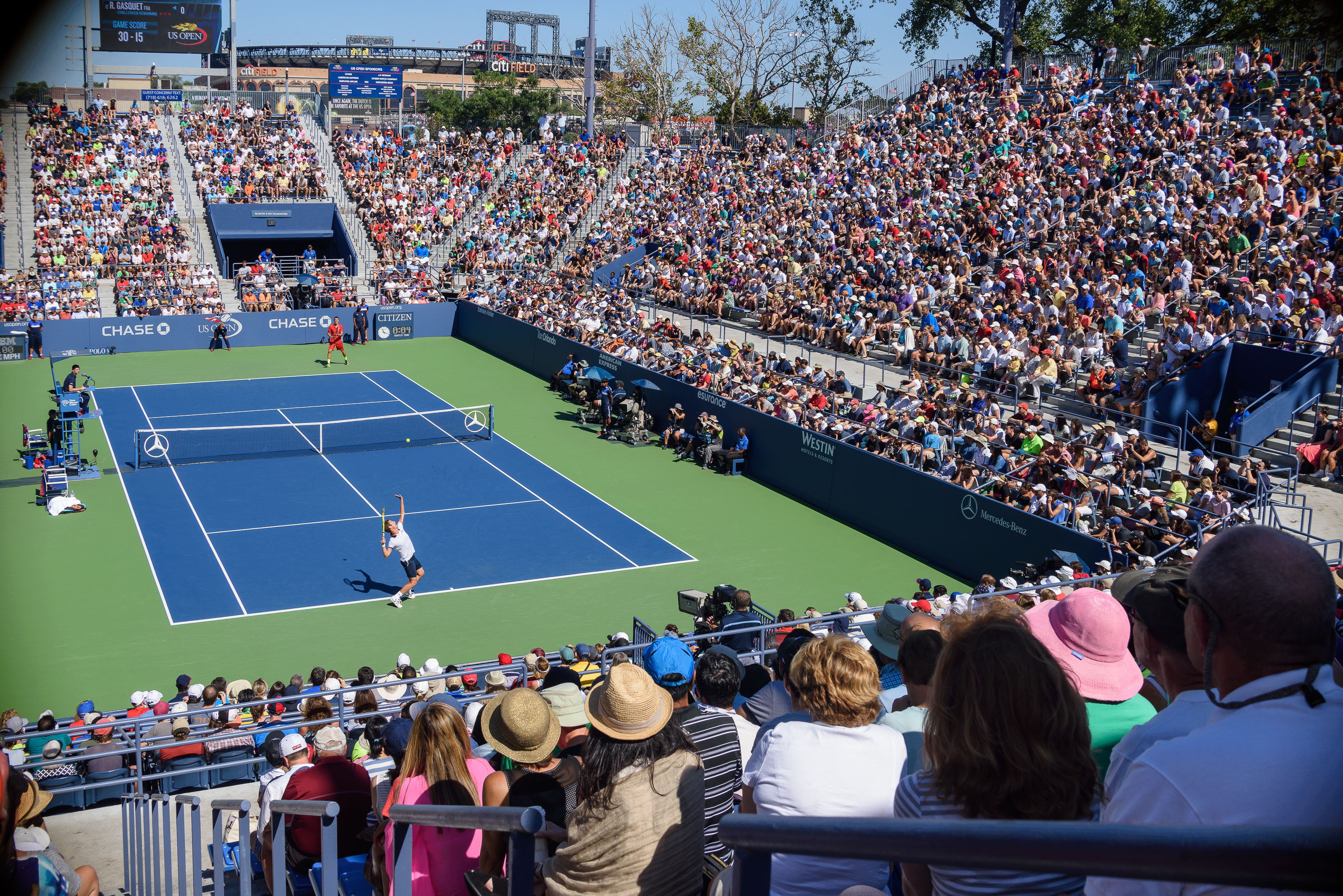 September 5, 2015 Grandstand Flushing, NY